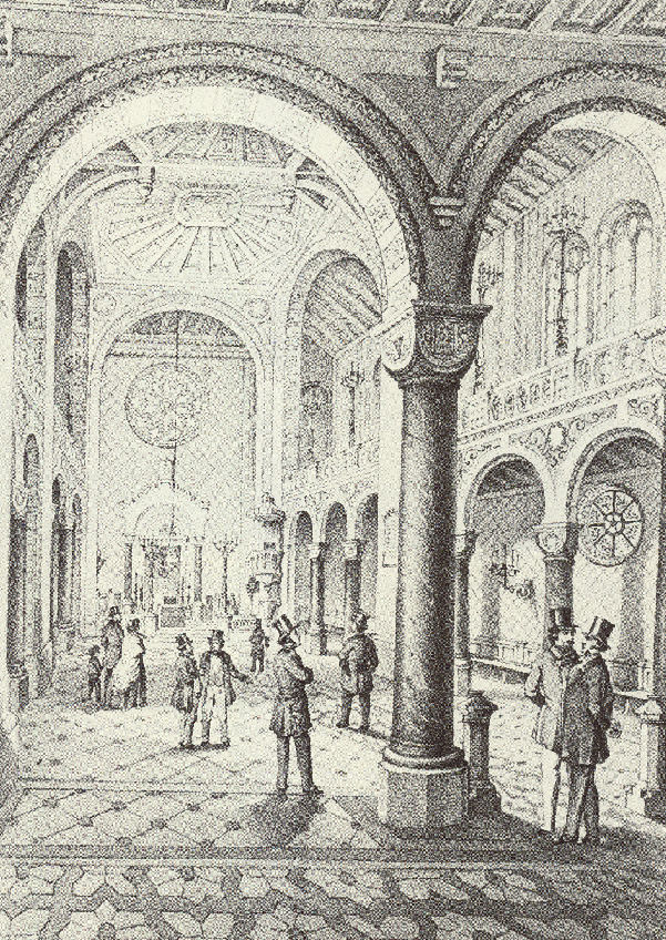 Hauptsynagoge Mannheim (Lithographie)